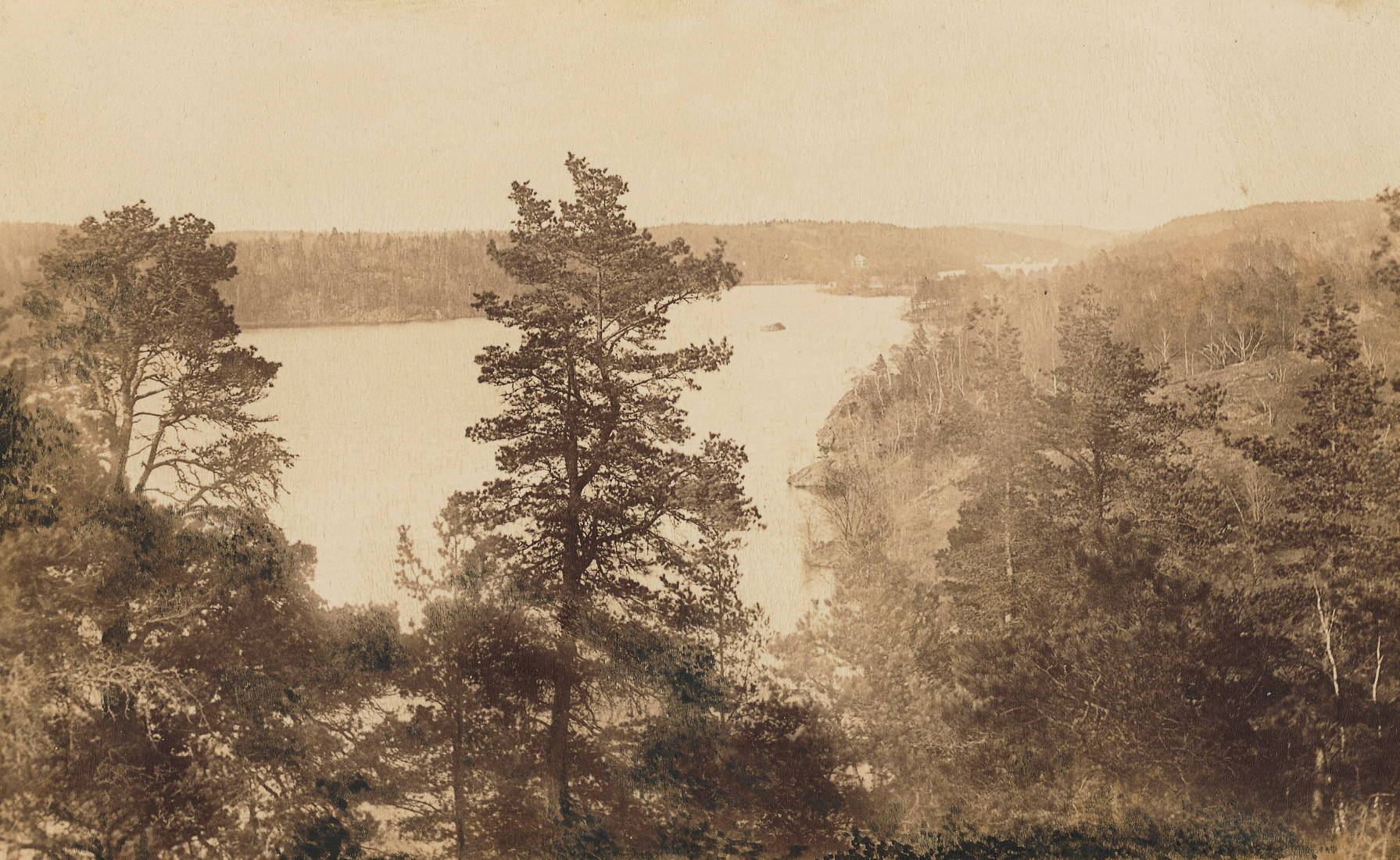 Vy över Långsjön från Långsjöhöjden